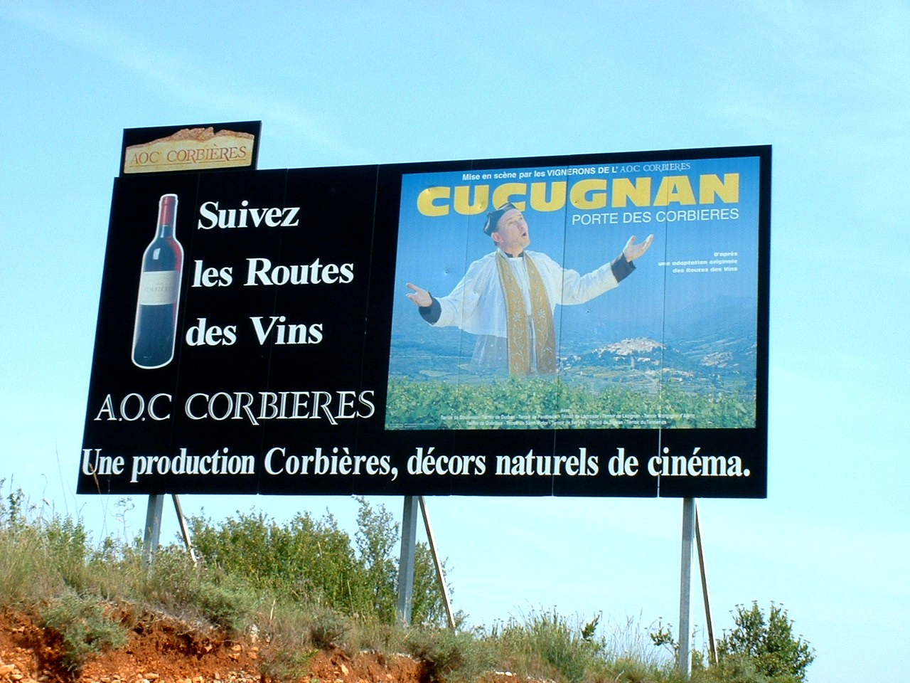 Panneau humoristique de la route des vins